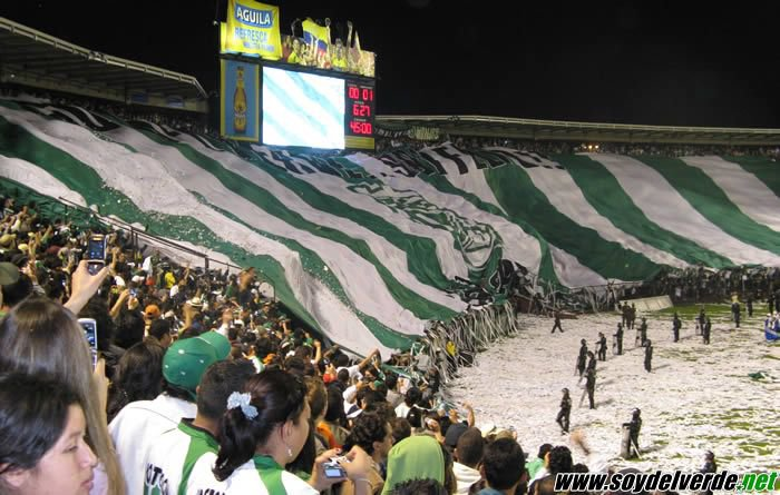 Los Del Sur Bogota